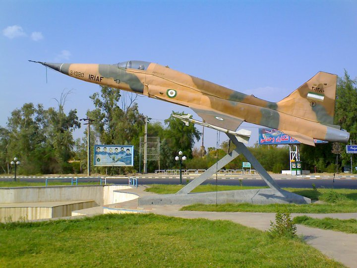 میدان ورودی پایگاه چهارم شکاری دزفول